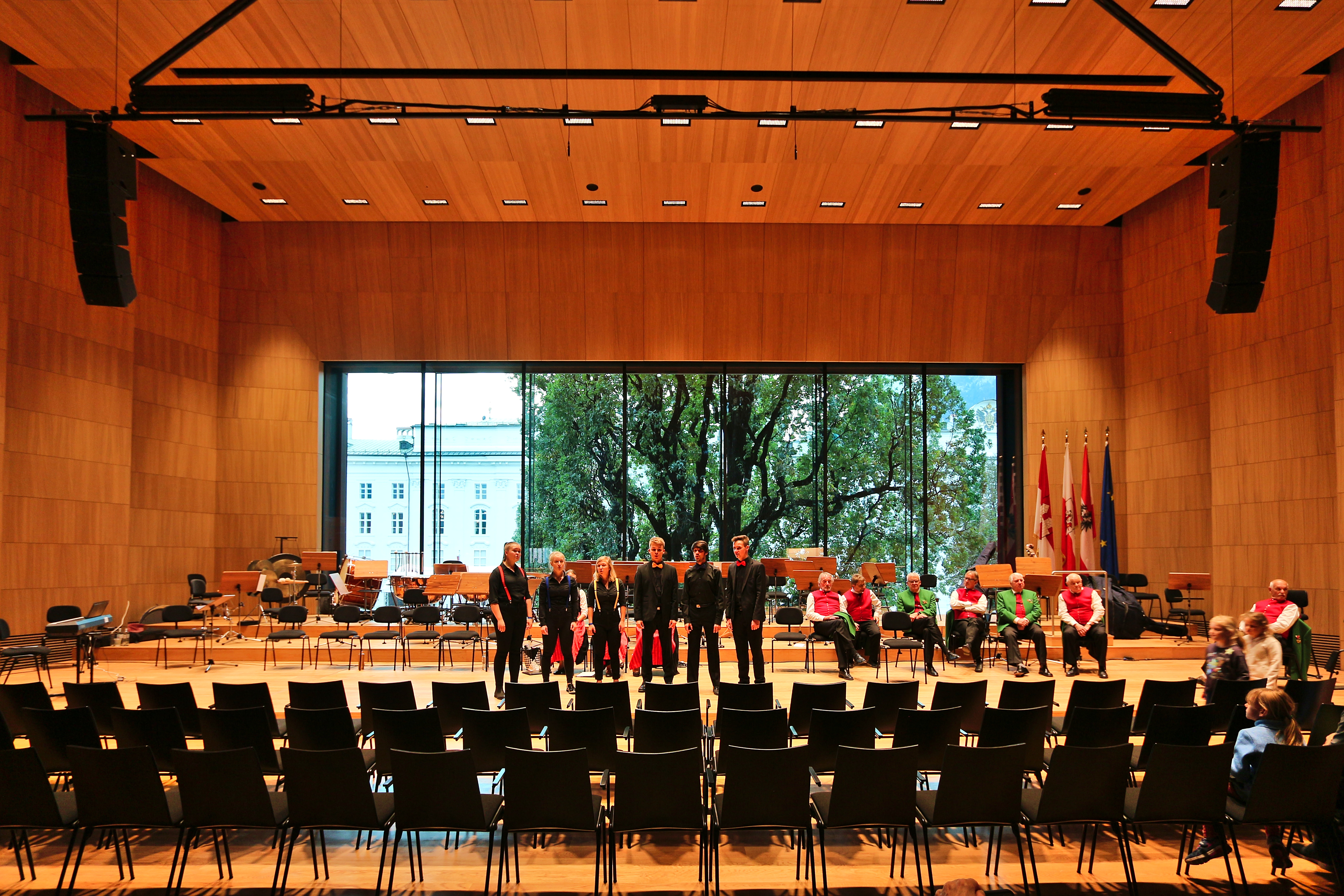 Haus der Musik Innsbruck Großer Saal